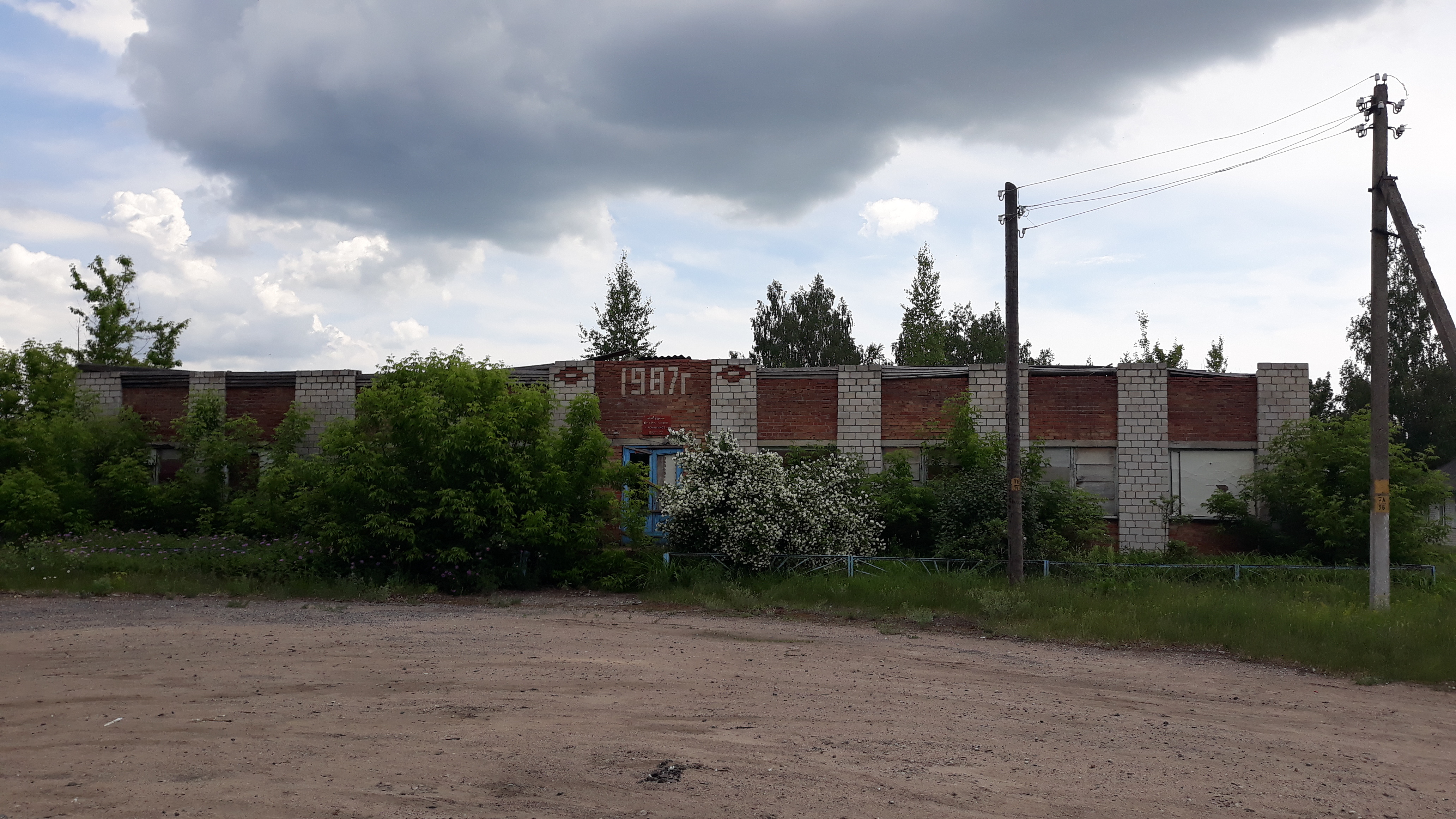 Краявід вёскі